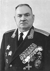 Андрей Васильевич Хрулёв (1892 — 1962) — советский военный и государственный деятель. Генерал армии